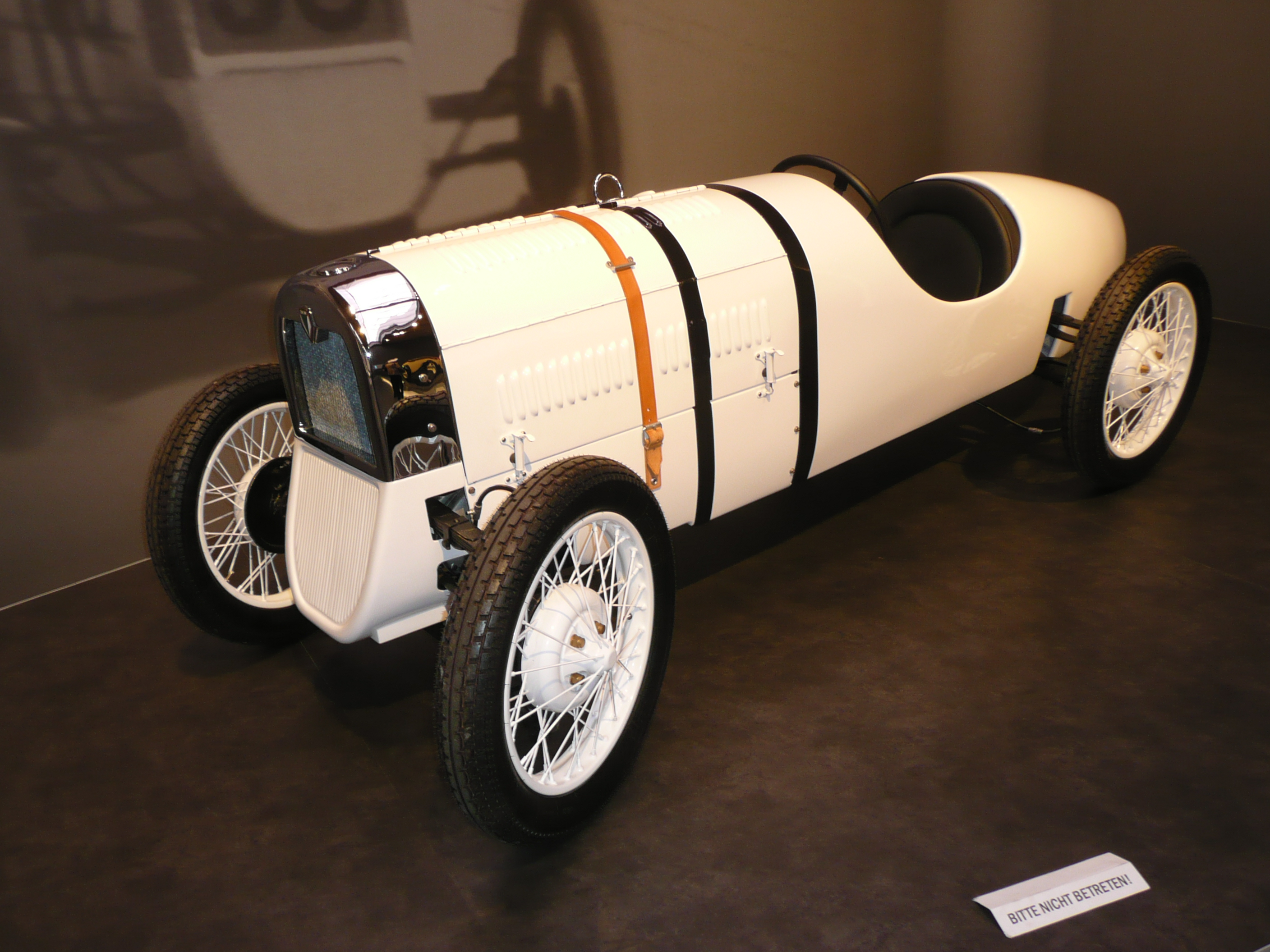 DKW F1 Sportwagen aus dem Jahr 1931 im August-Horch-Museum Zwickau